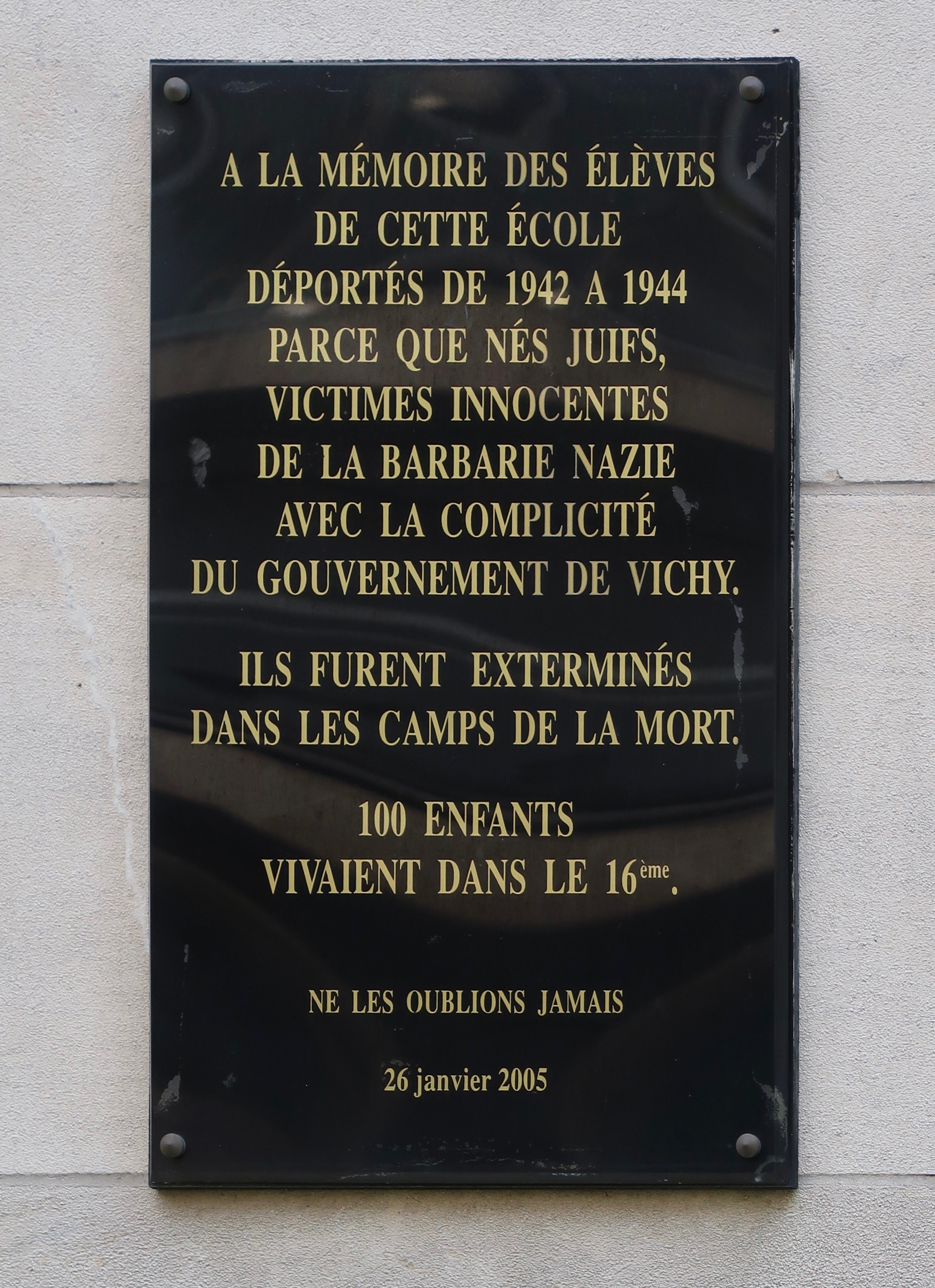 Plaque sur la façade du lycée Janson-de-Sailly, rue de la Pompe : déportation d'enfants Juifs de 1942 à 1944.